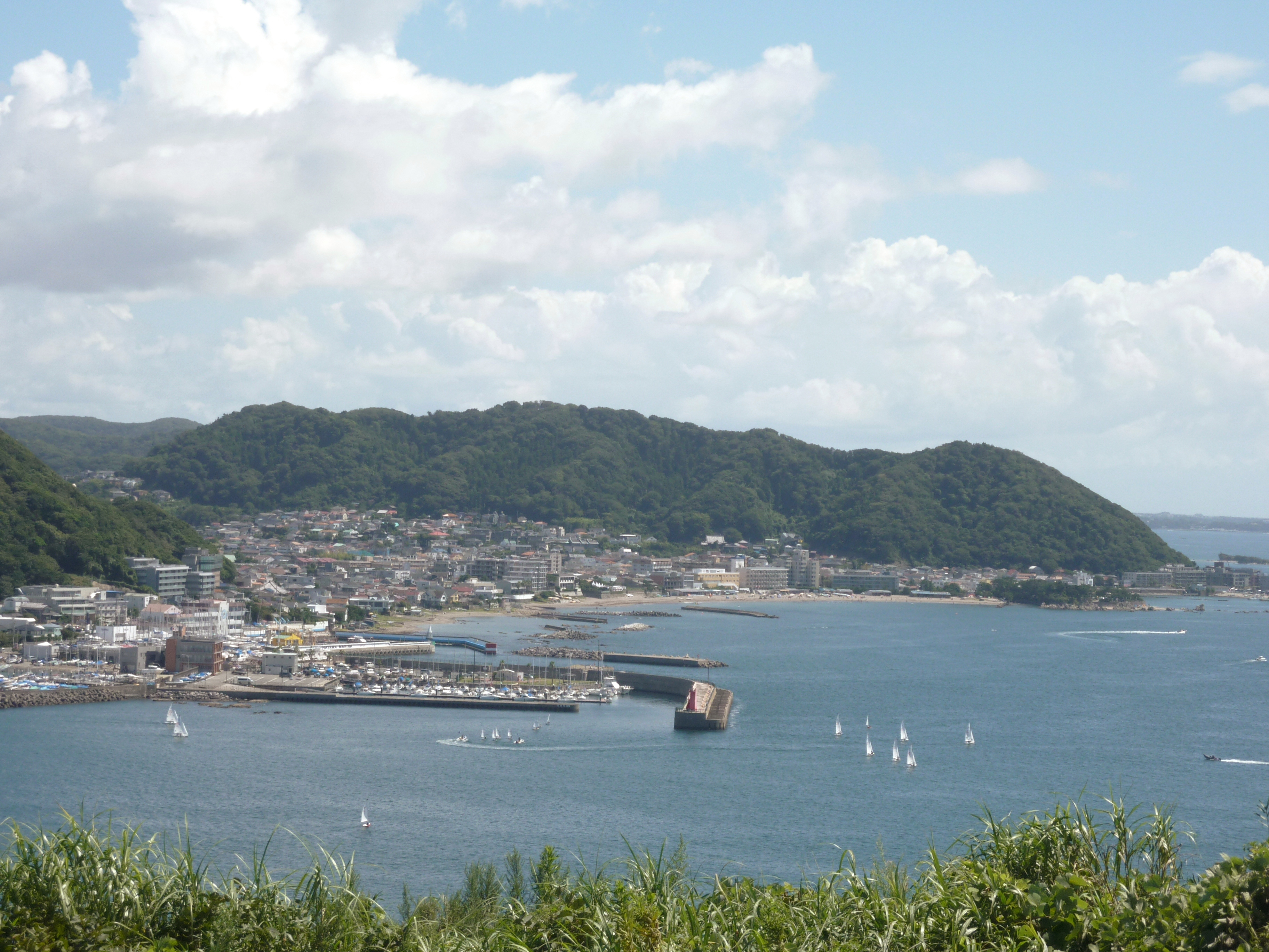 神奈川県逗子市の大崎公園から葉山町の「はやま三ヶ岡山緑地」を望む。